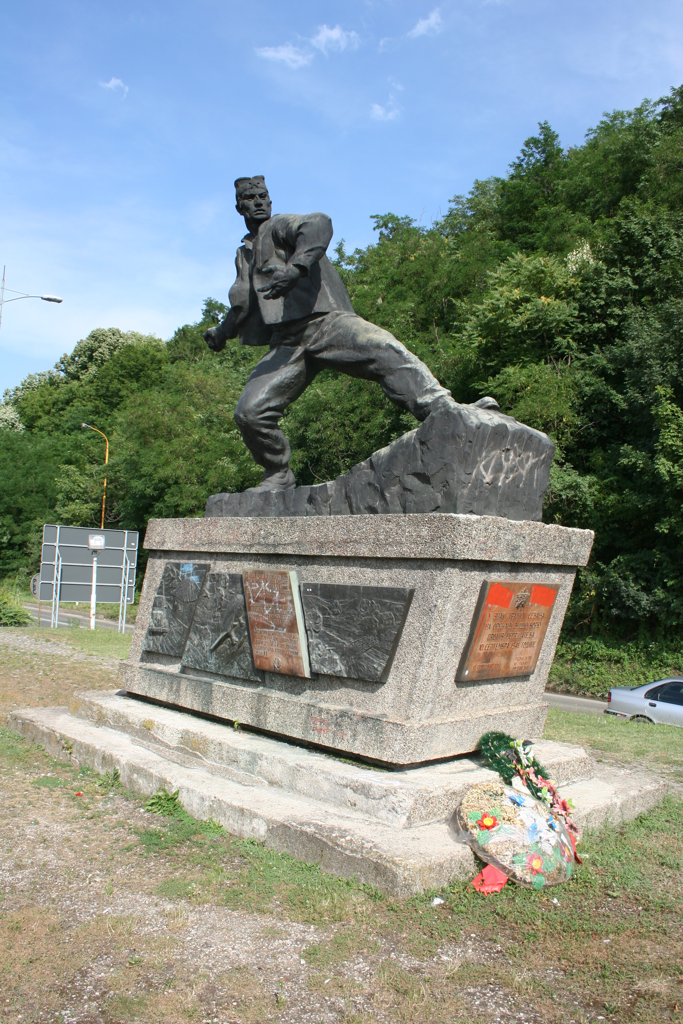 Ljig, spomenici NOB-a